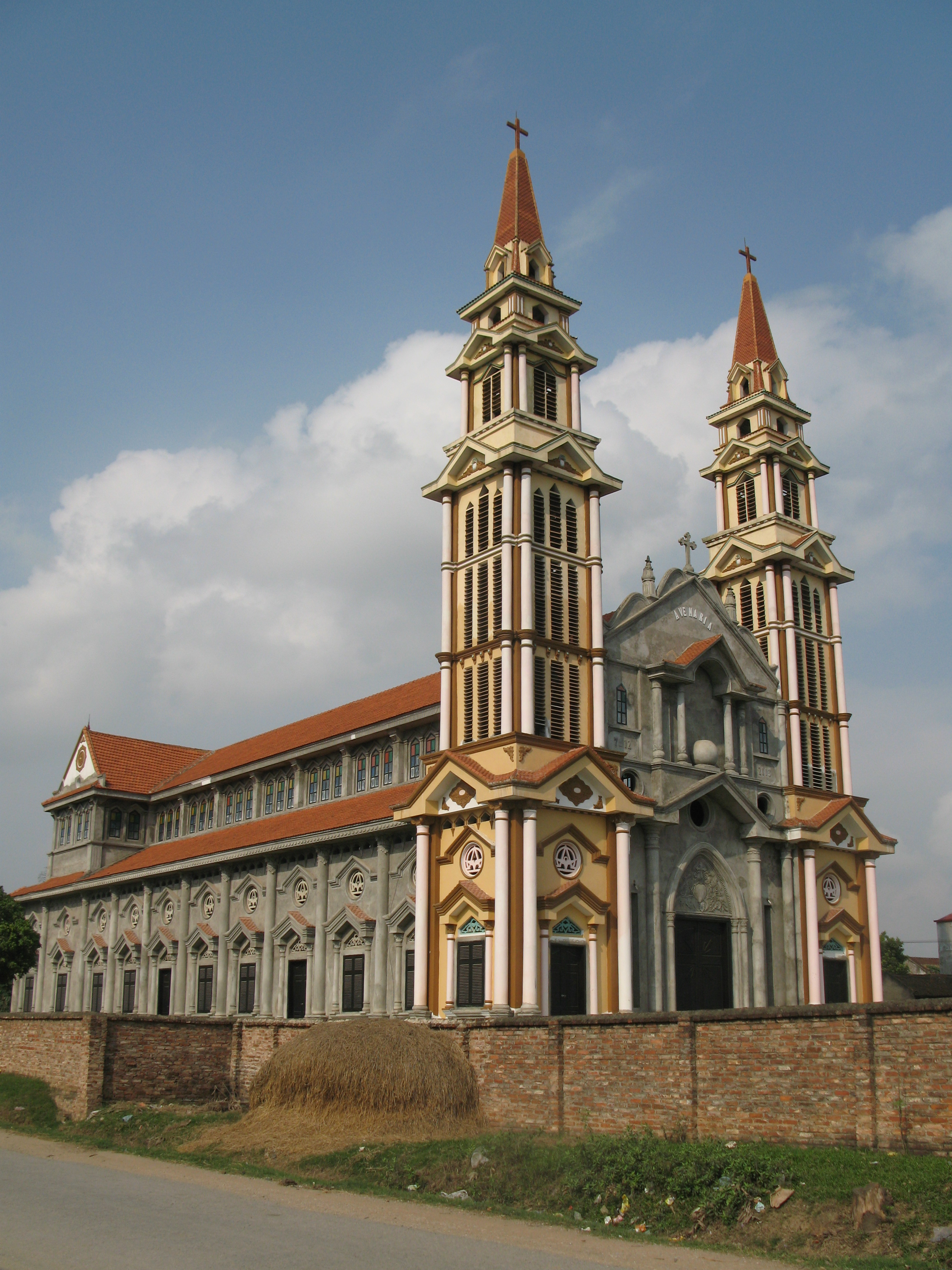 Nhà thờ Ngọc Liễn, xã Châu Minh, Hiệp Hòa, Bắc Giang